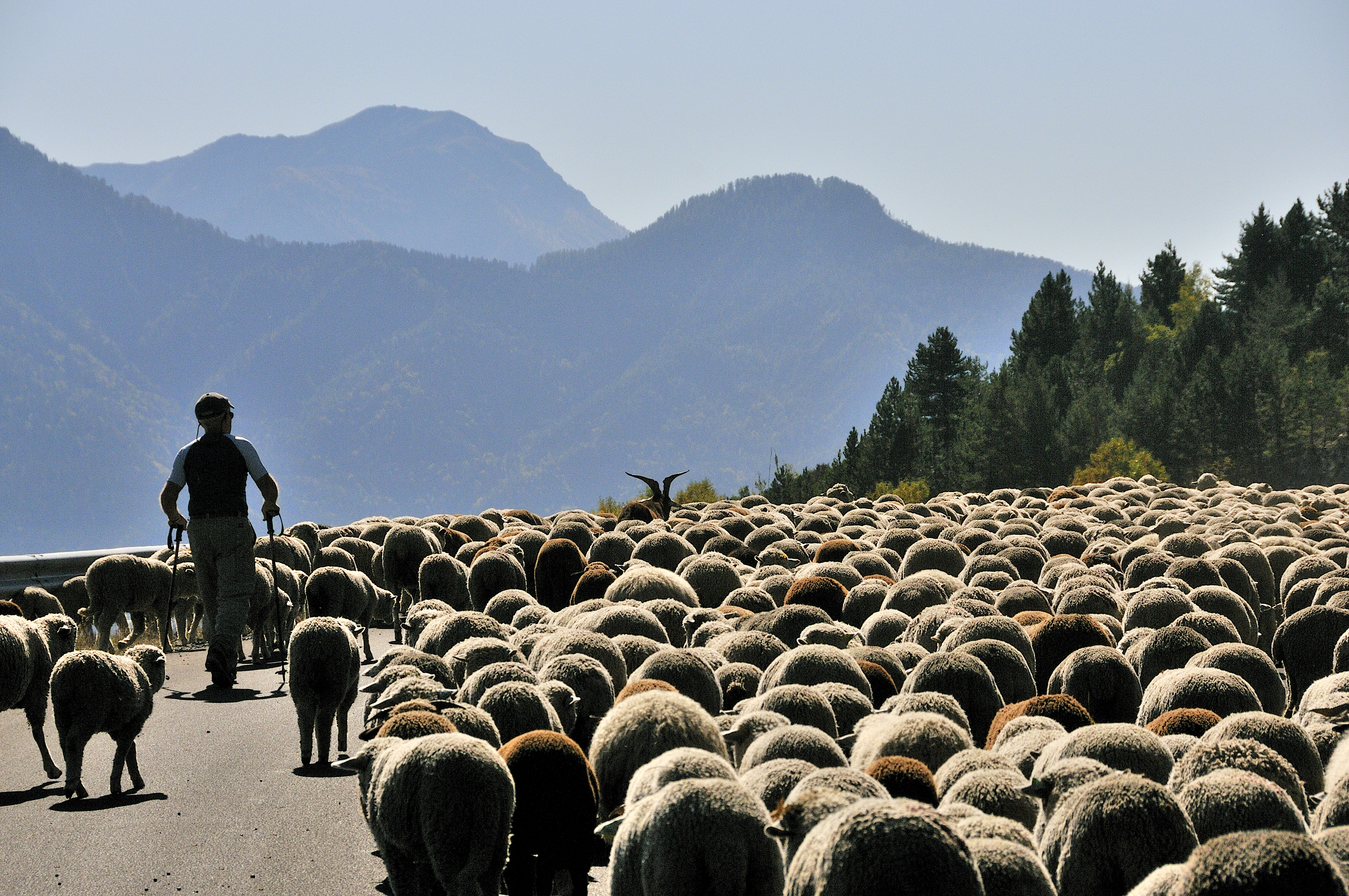 Fotografia realizzata nel contesto del progetto LIFE PastorAlp